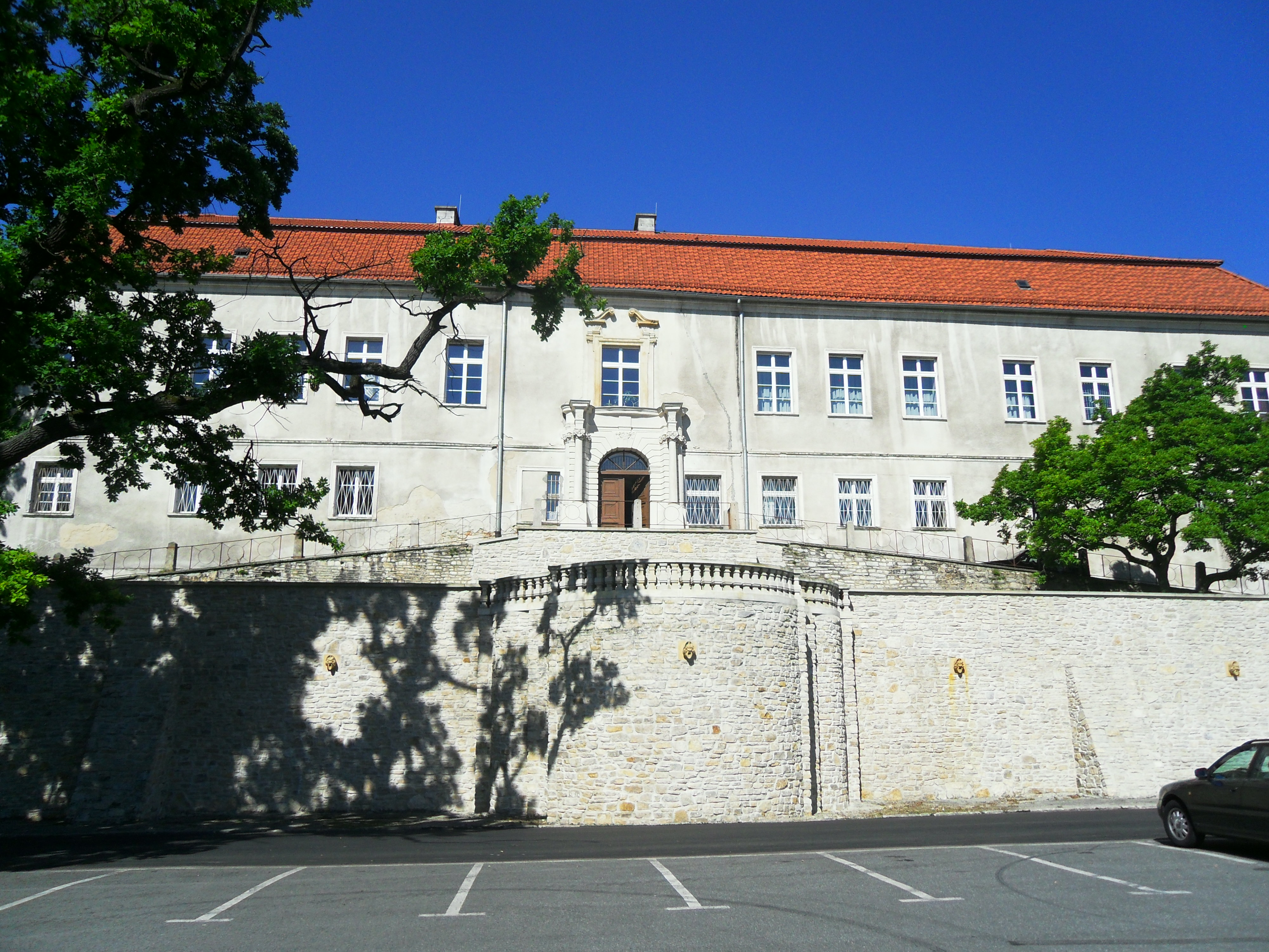 widok od strony rzeki